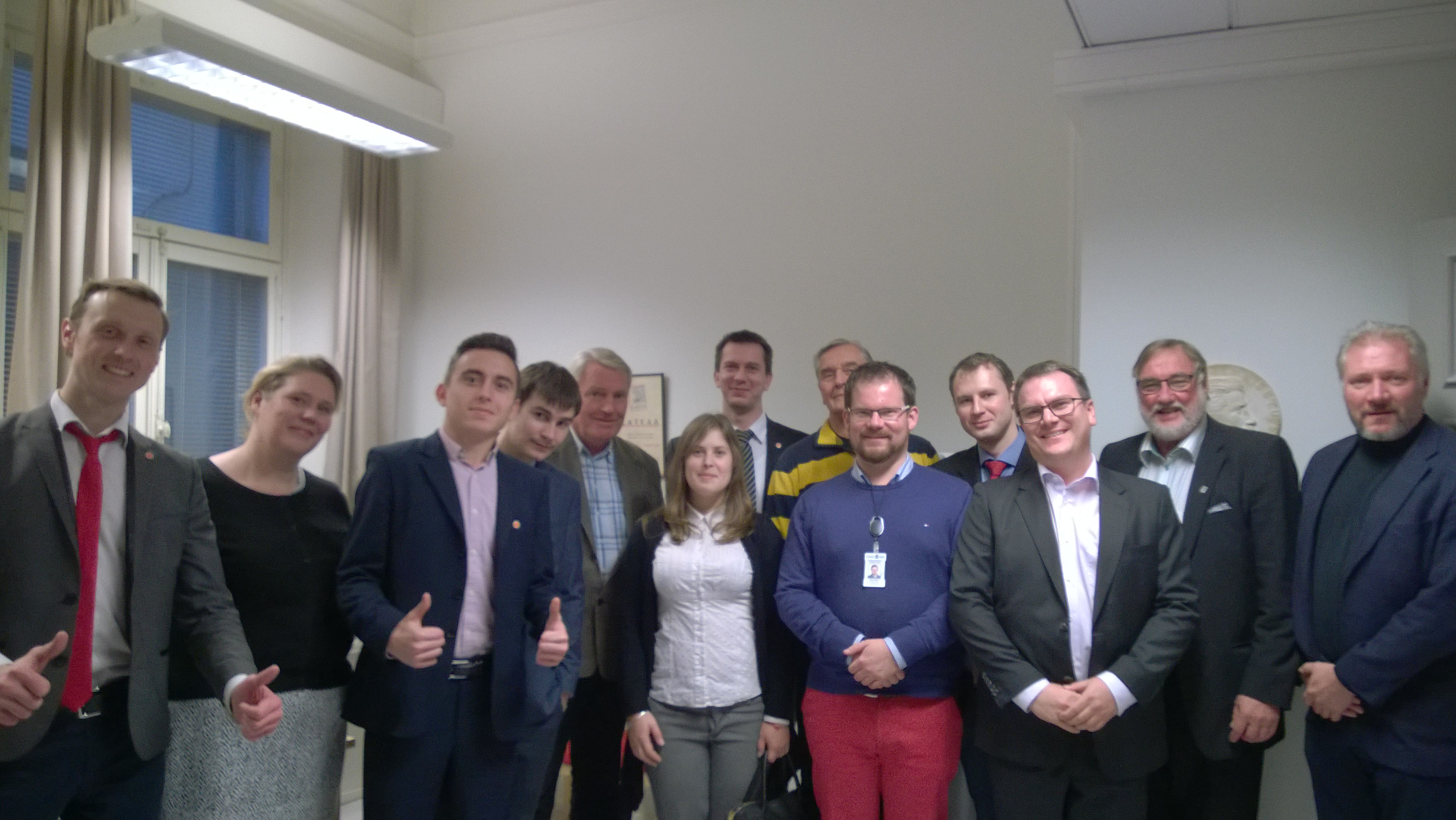 РСДСМ в Турку с представителями фракции Социал-демократов в городском совете.jpg